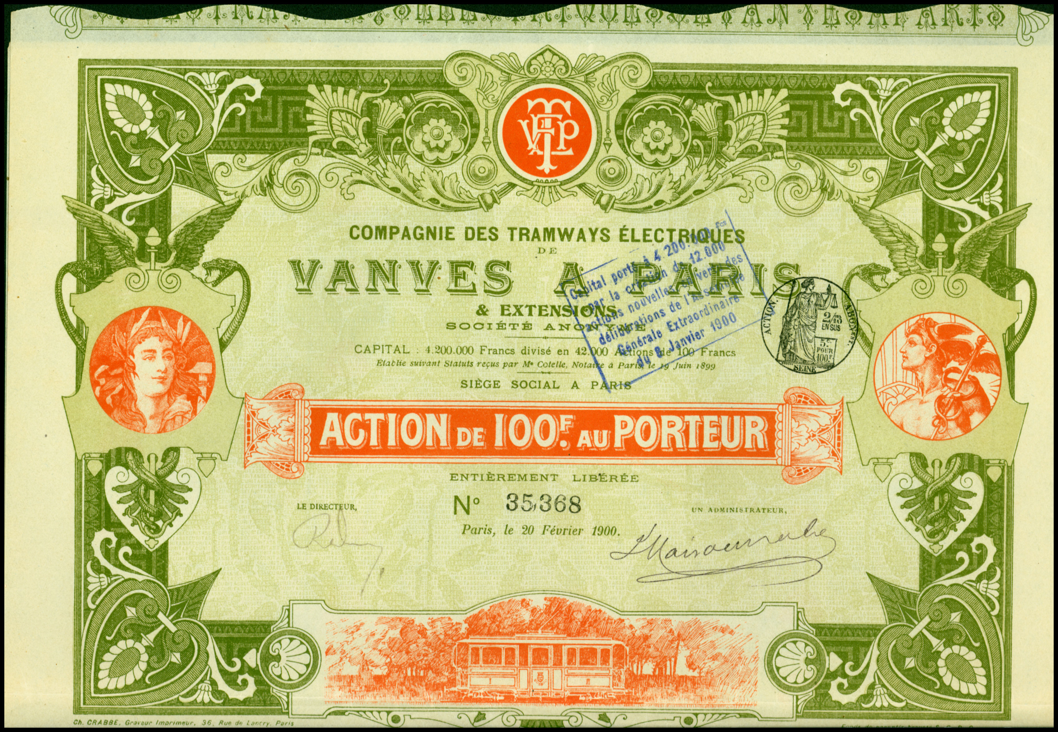 Aktie über 100 Francs der Comp. des Tramways Électriques de Vanves à Paris & Extensions S. A. vom 20. Februar 1900